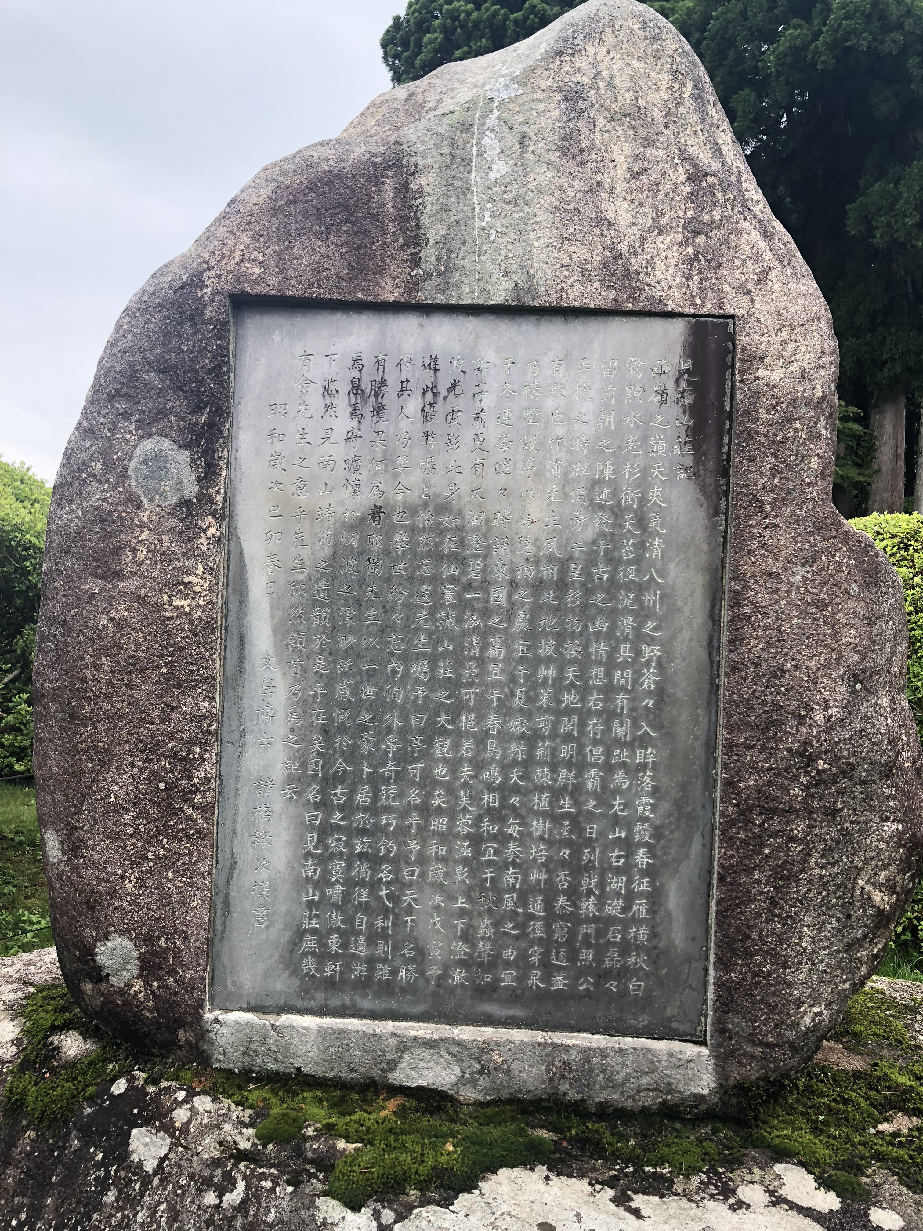 诸桥辙次1939年于日本箱根撰书《见南山庄》碑文